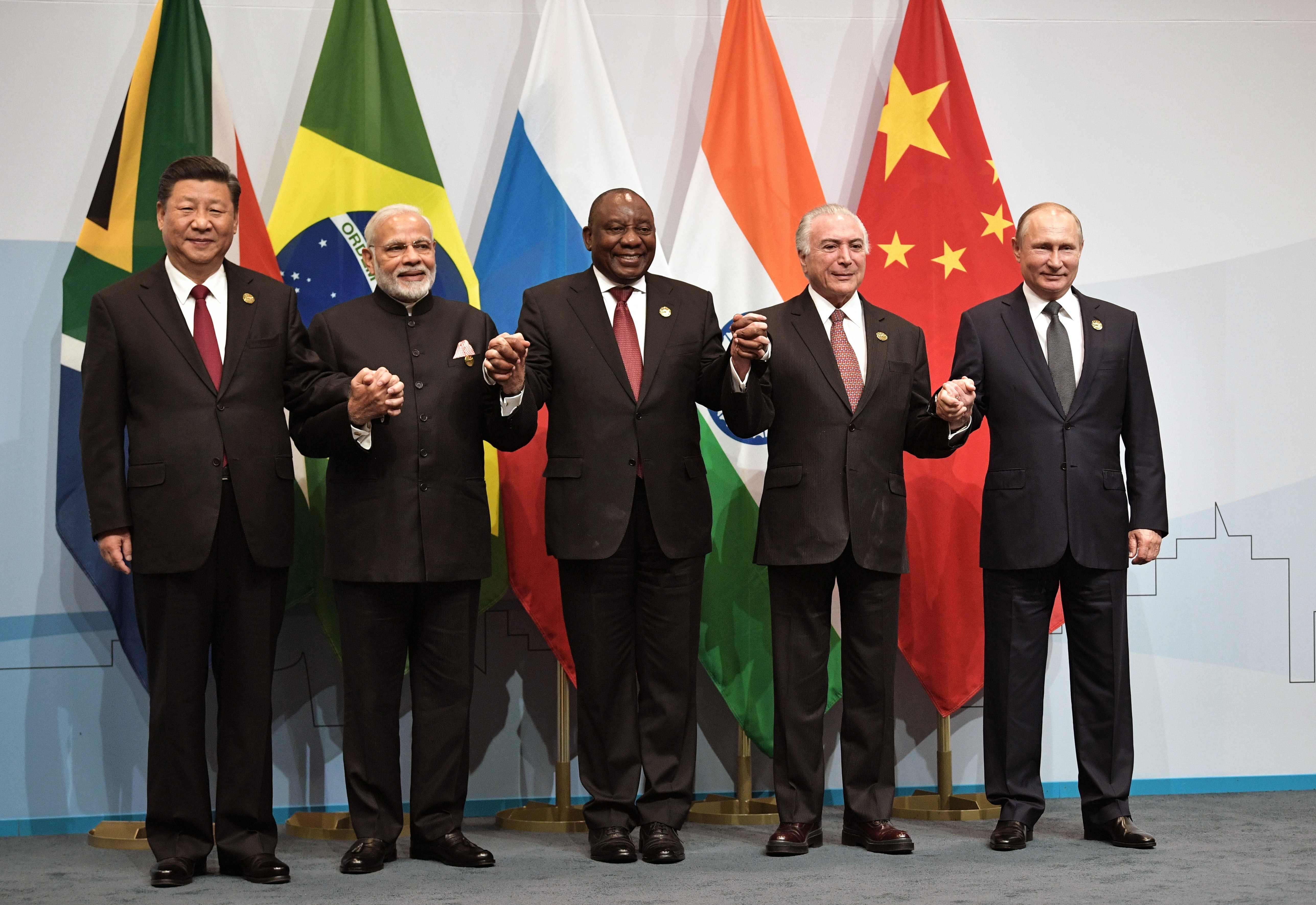 Участники саммита БРИКС.